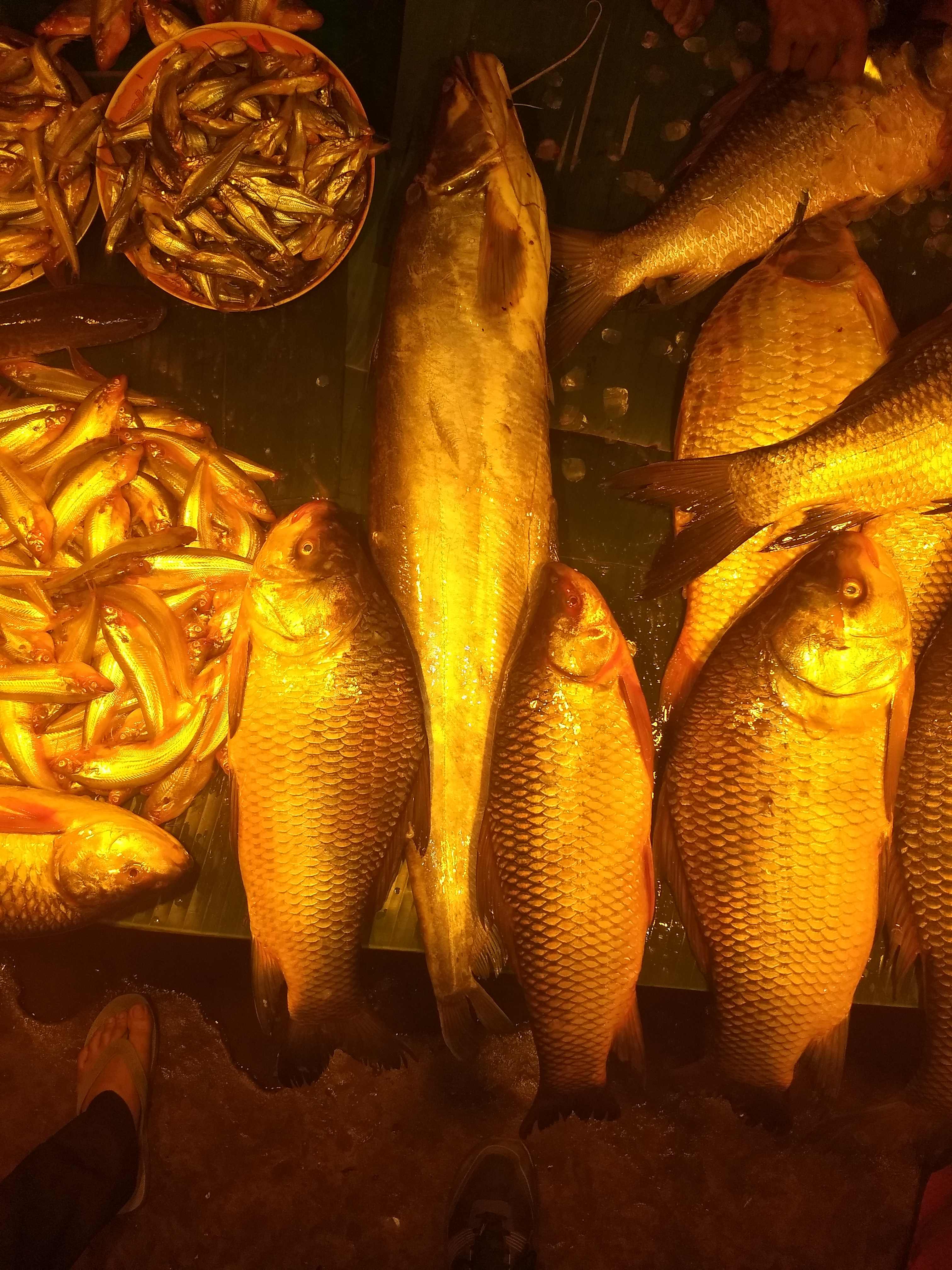 মাছের বাজার, রুই কাতলা, বোয়াল, পাবদা এবং ট্যাংরা মাছ বিক্রীর জন্য সাজিয়ে রাখা হয়েছে।